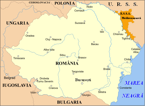 România Mare și RSSA Moldovenească. Republica Moldovenească a fost prescursoarea RSS Moldovenești și a republicii separatiste Transnistrene din zilele noastre.